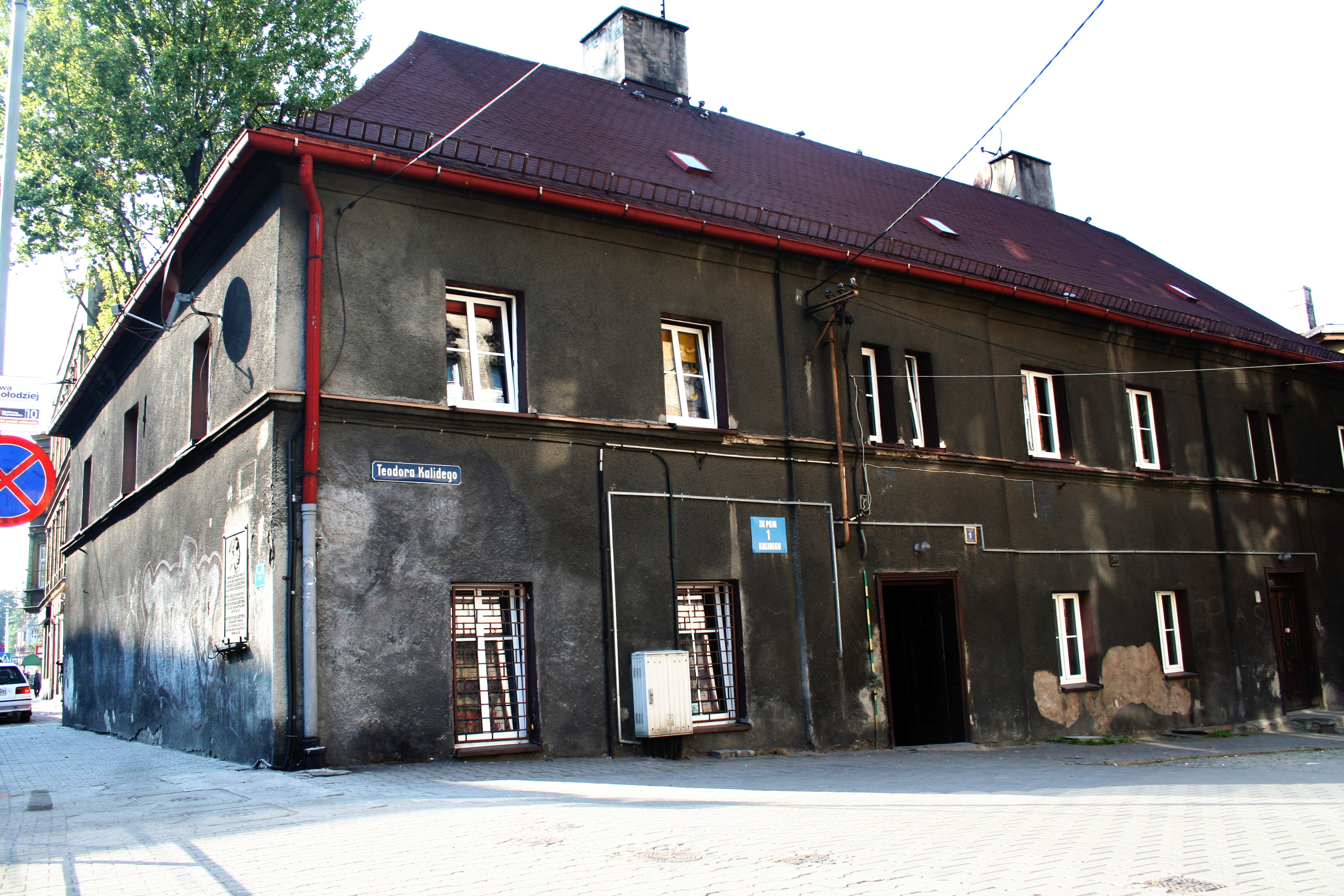 Chorzów - budynek mieszkalny – dom rzeźbiarza Teodora Erdmanna Kalidego